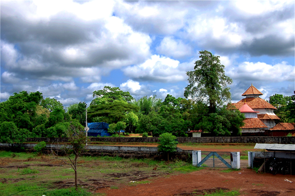 Parambanthali Temple